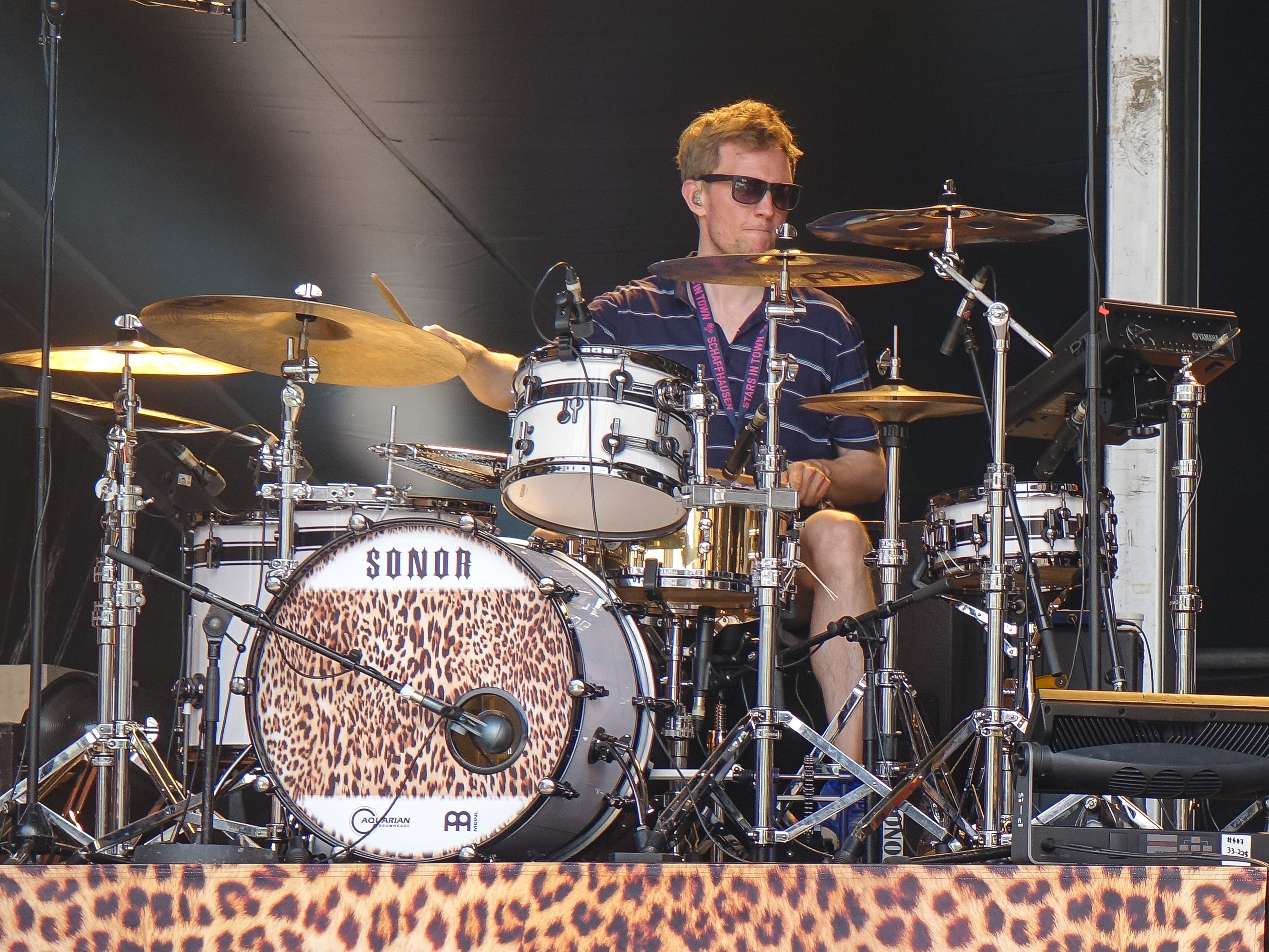 Jost Nickel trommelt hier für die Band Disko No.1 mit Jan Delay